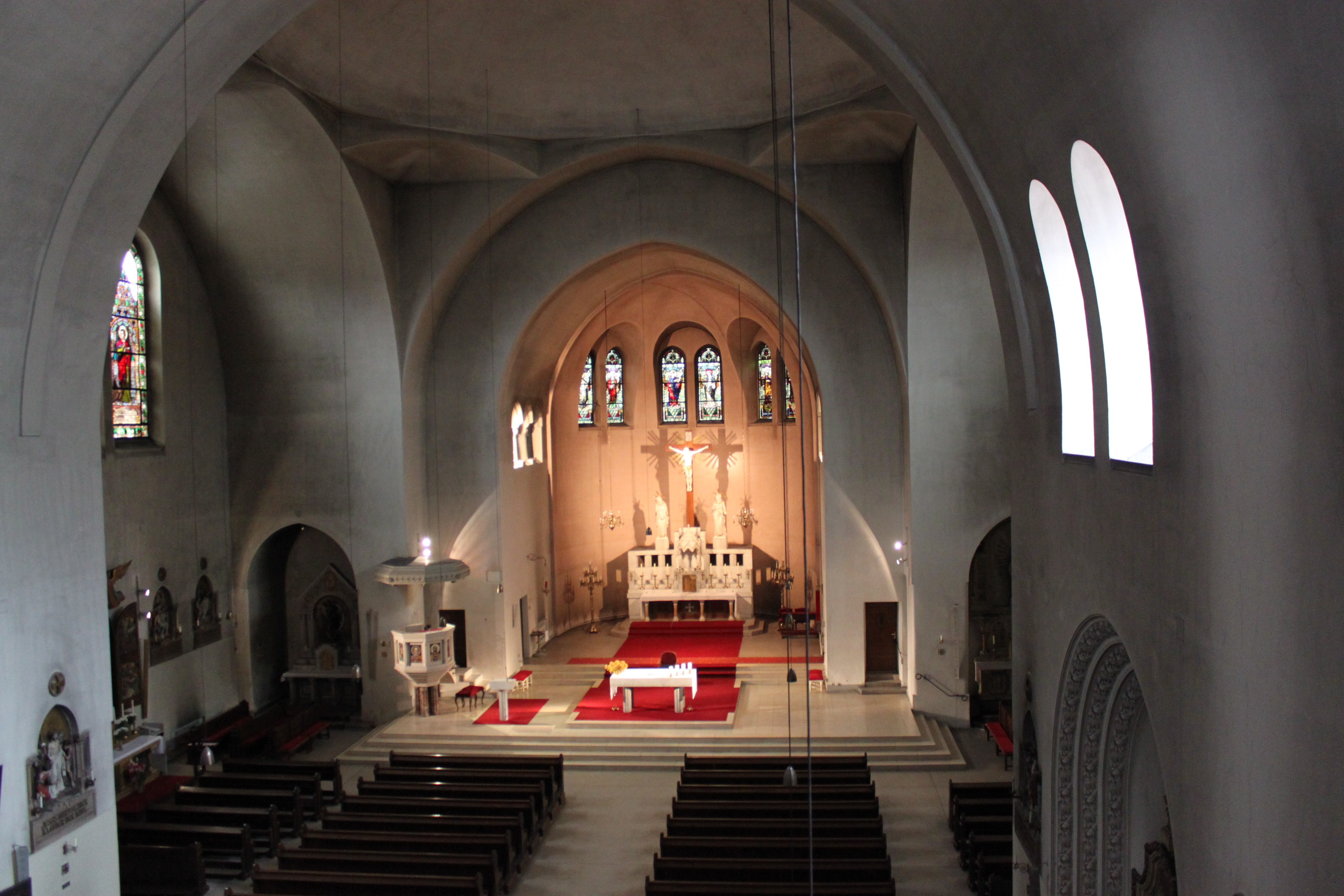 Innenraum der Alt-Ottakringer Pfarrkirche, Wien 16